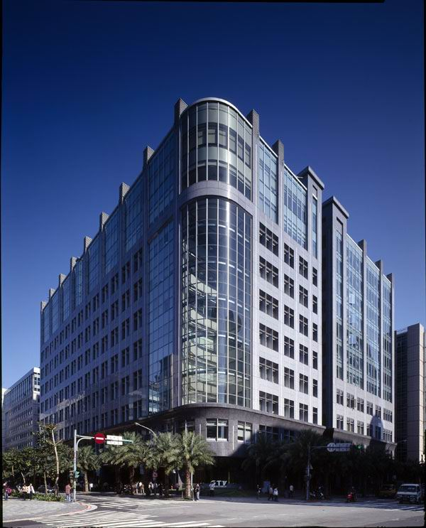 八大電視總部大樓，地址：臺北市內湖區瑞光路455、457號。